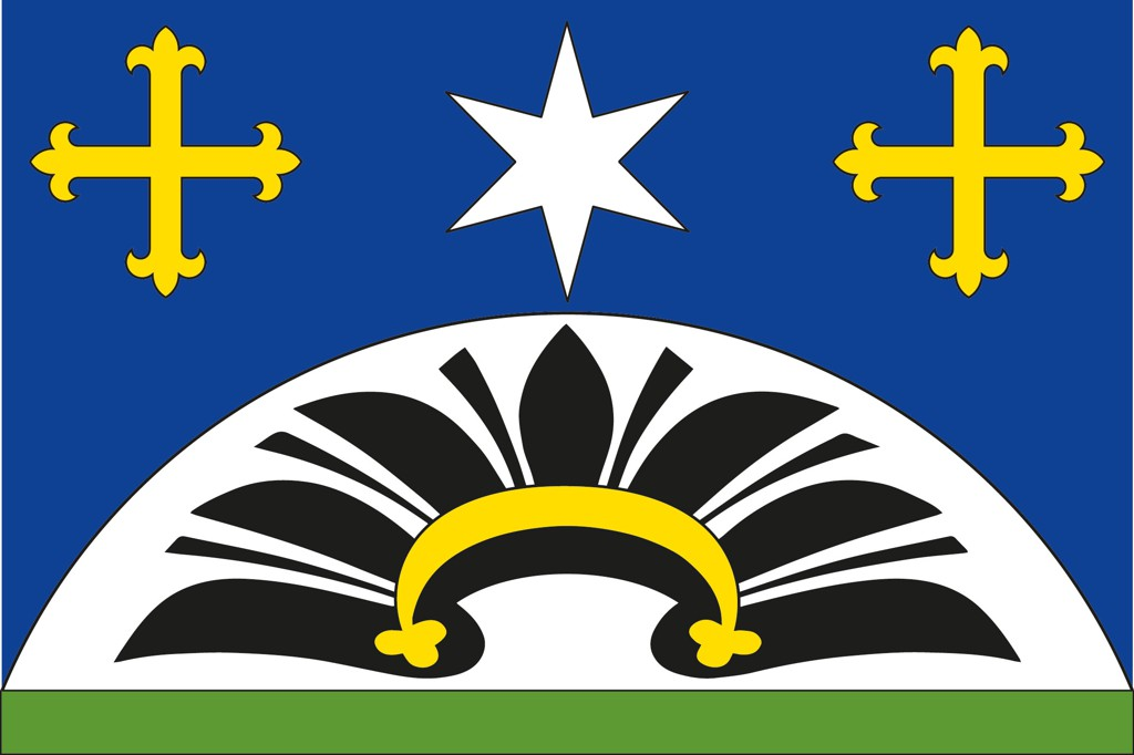 Kadolec, vlajka.